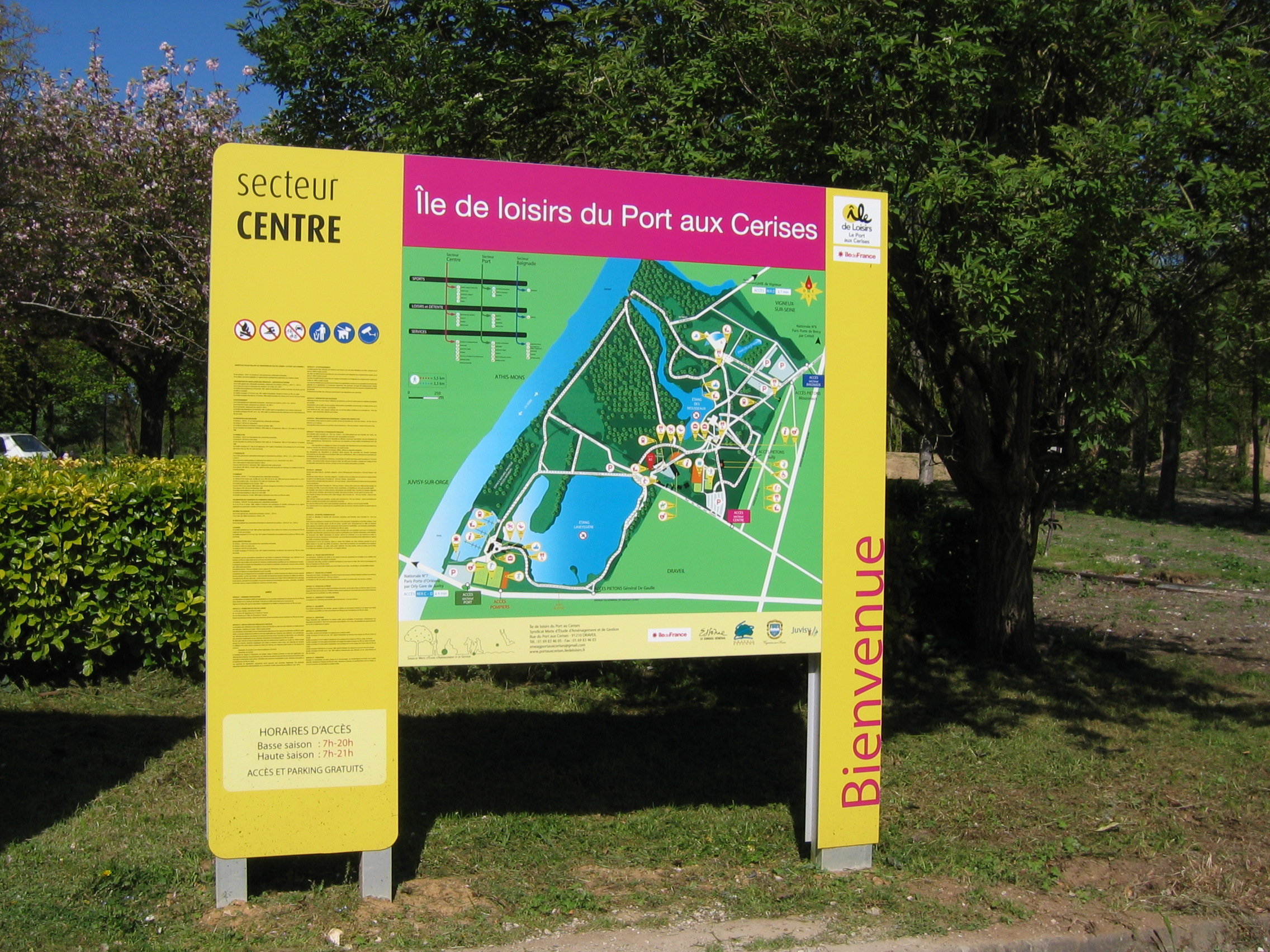 Base de plein air et de loisirs du Port-aux-Cerises - panneau descriptif pour visiteurs